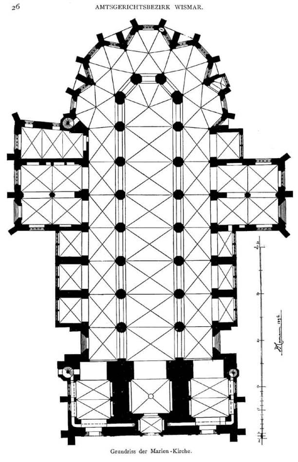 Plan der Marienkirche in Wismar